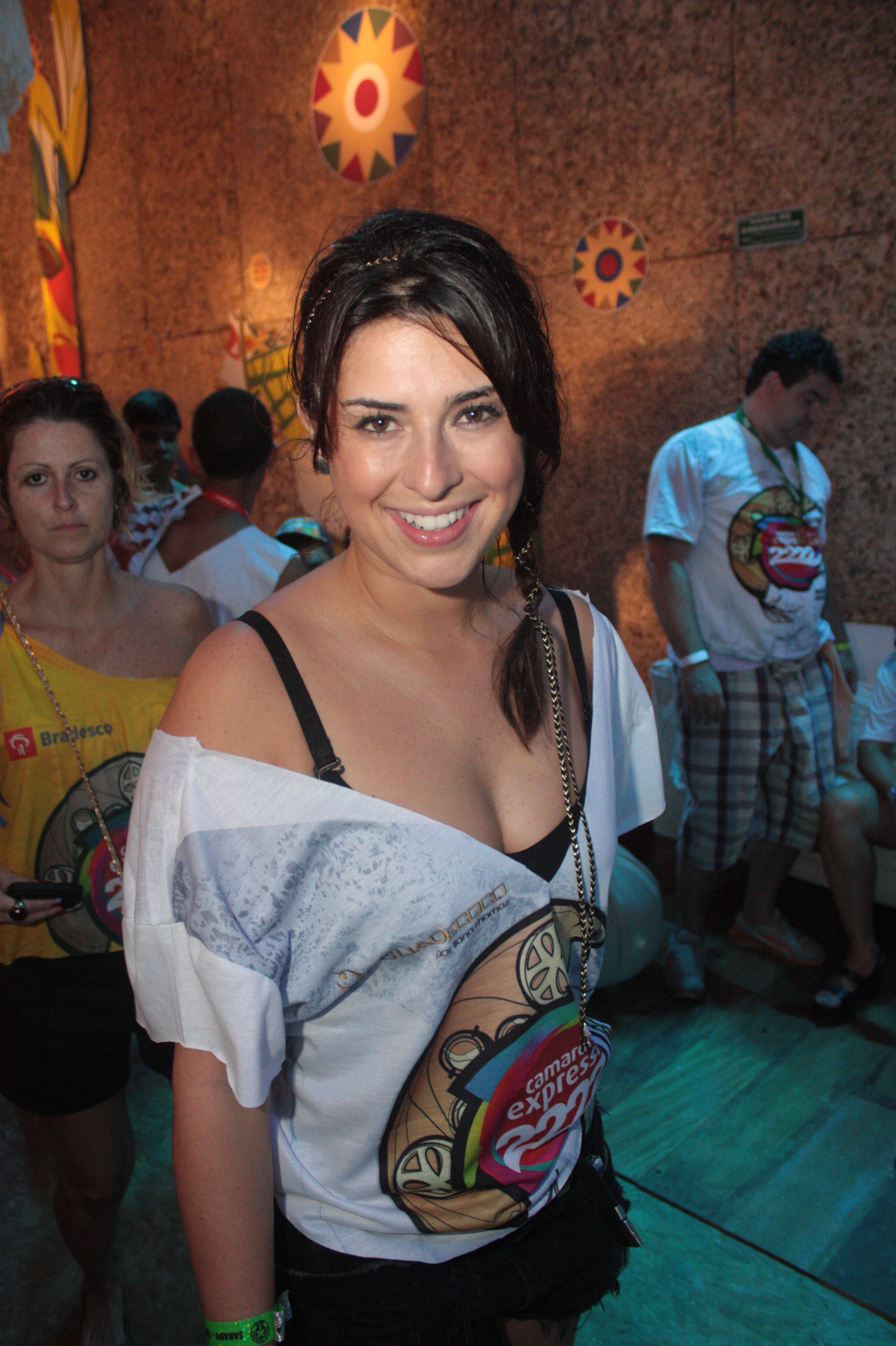 Atriz Fernanda Paes Leme no carnaval da Bahia em 2012